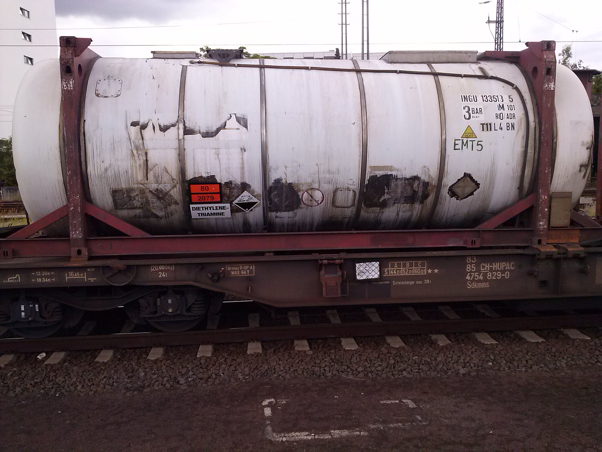 Tankcontainer mit Diethylentriamin im Darmstädter Hauptbahnhof